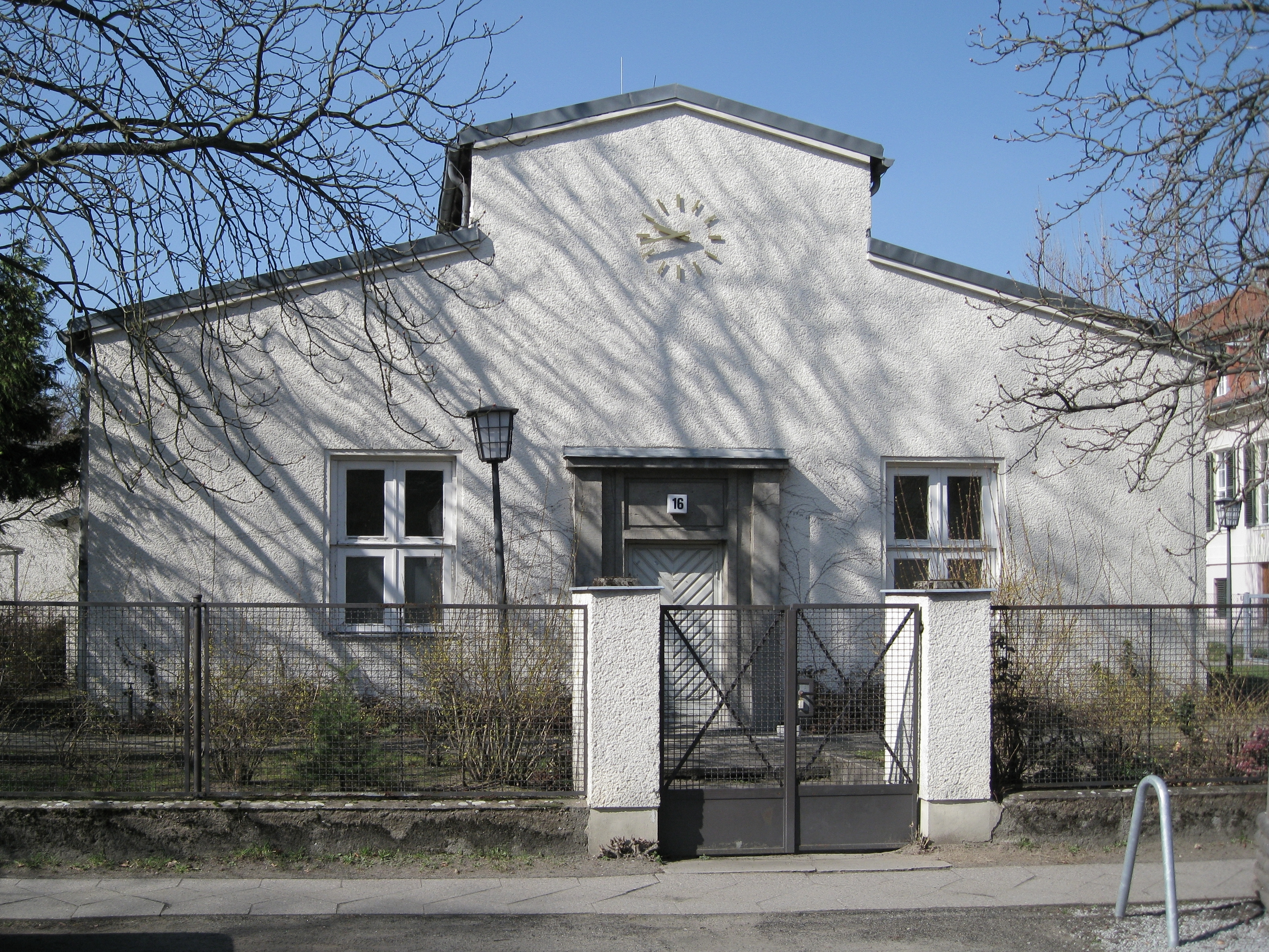 Kältelaboratorium